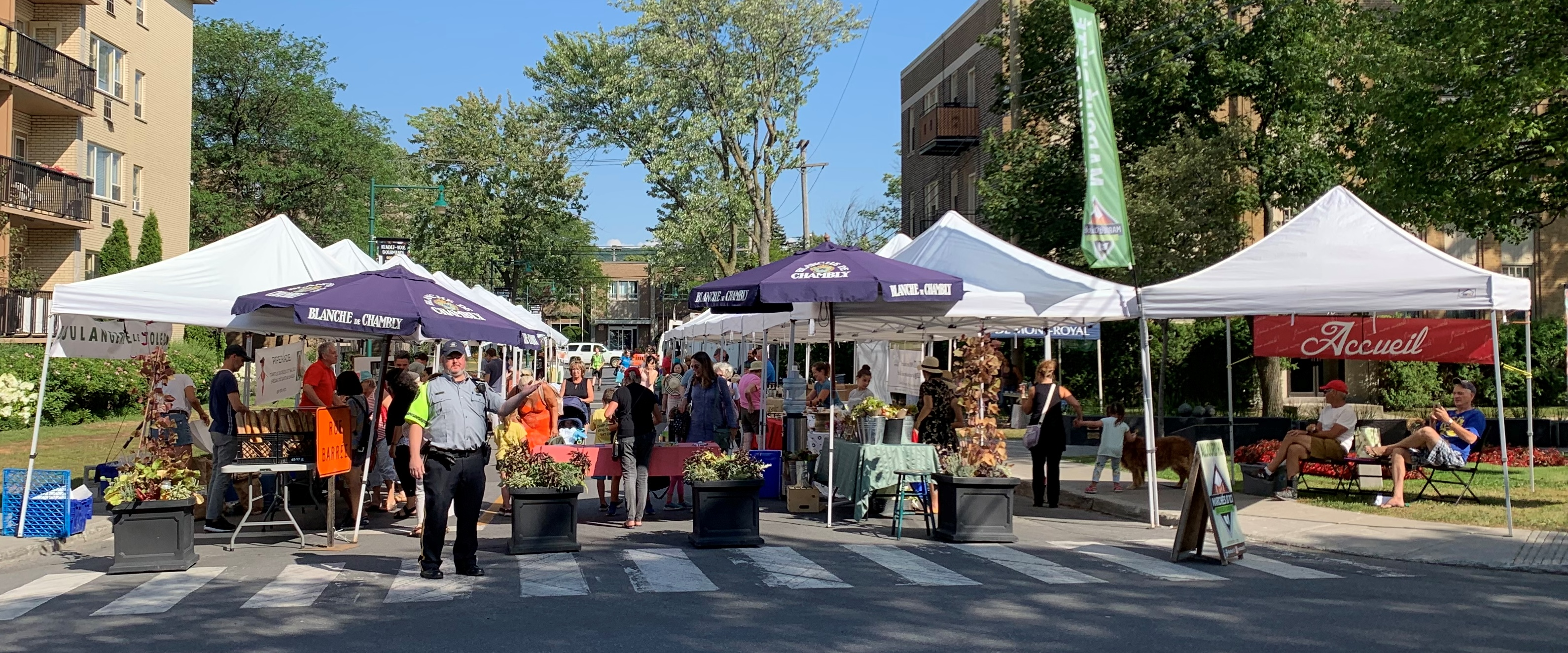 Mały rynek warzywny w środku miasta Mont Royal czynny w okresie letnim